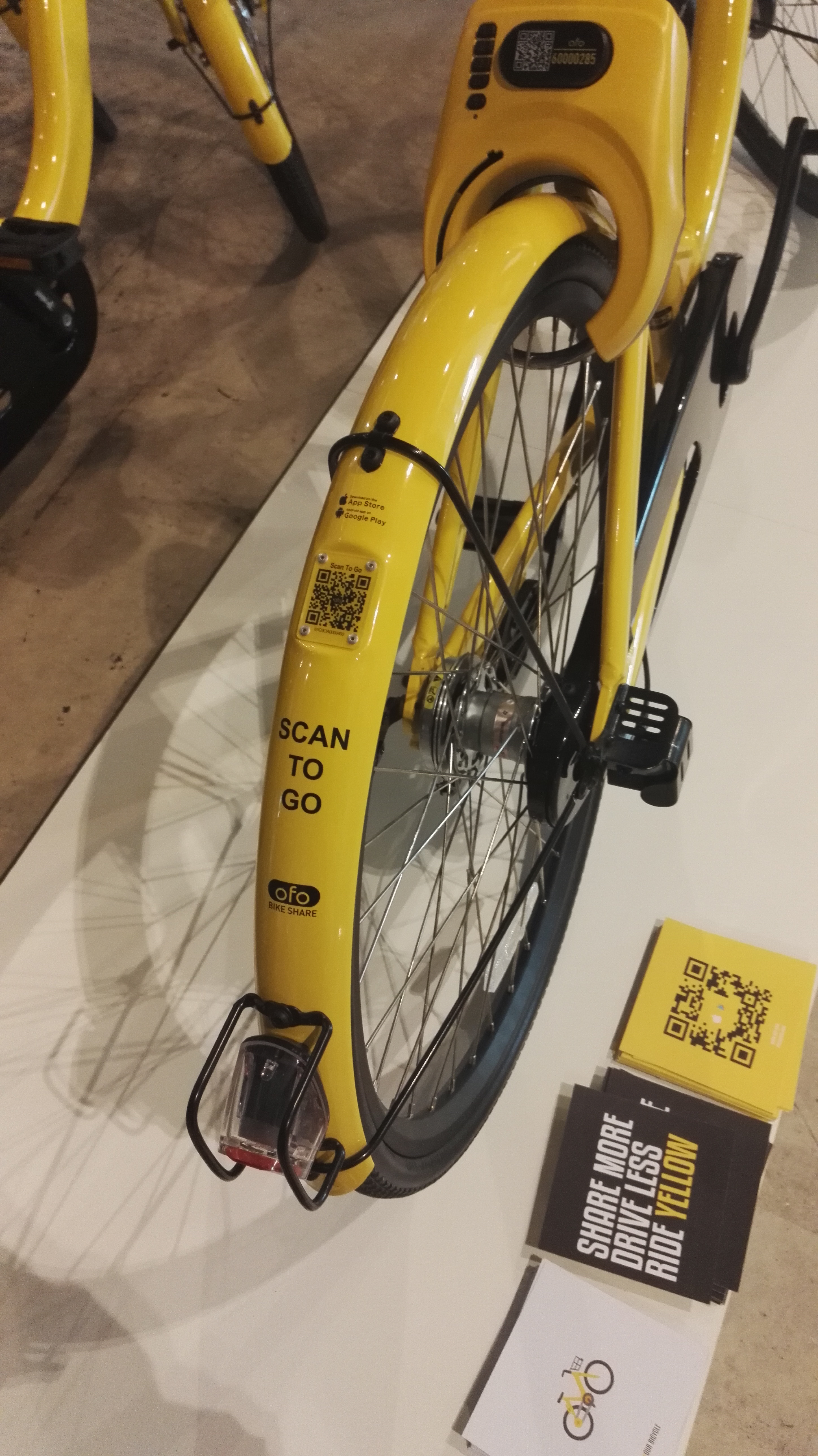 Dettaglio posteriore bici ofo